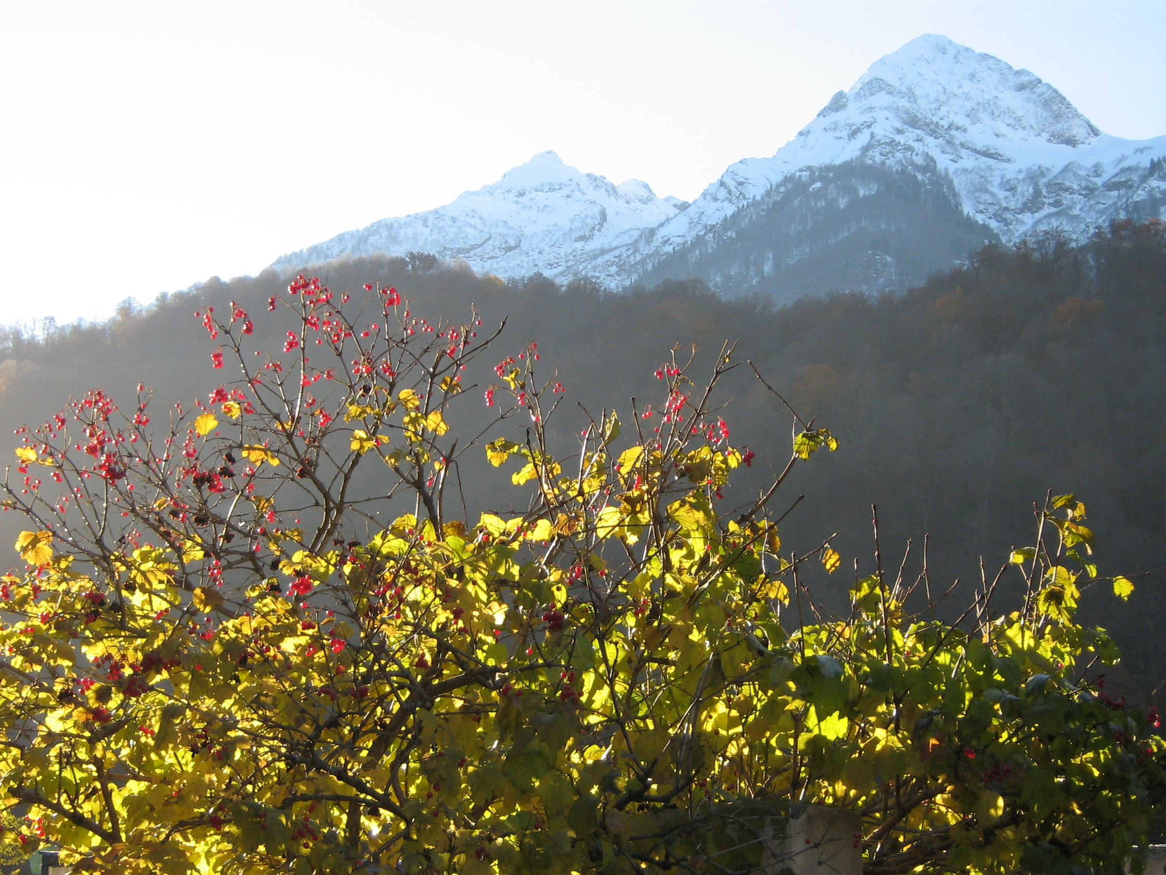 Monte Aigba, Cáucaso occidental, krai de Krasnodar, Rusia